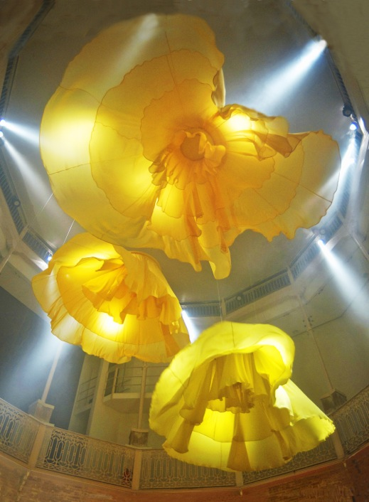 Fotografía de escultura/Intervención. Tela, hierro, madera y ventiladores. Cinco piezas de 1,6 x 2 x 2 m